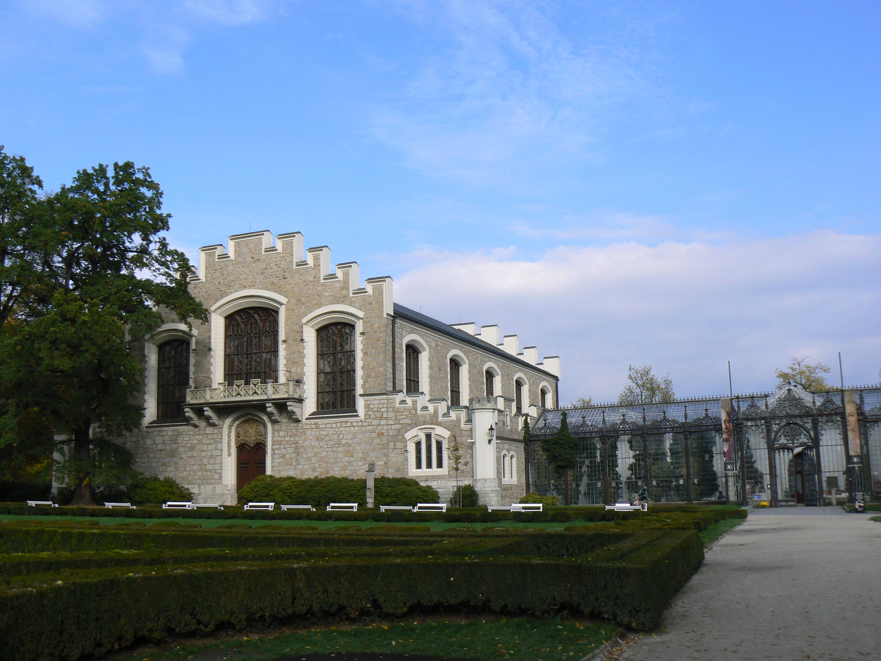 AJG Hluboká